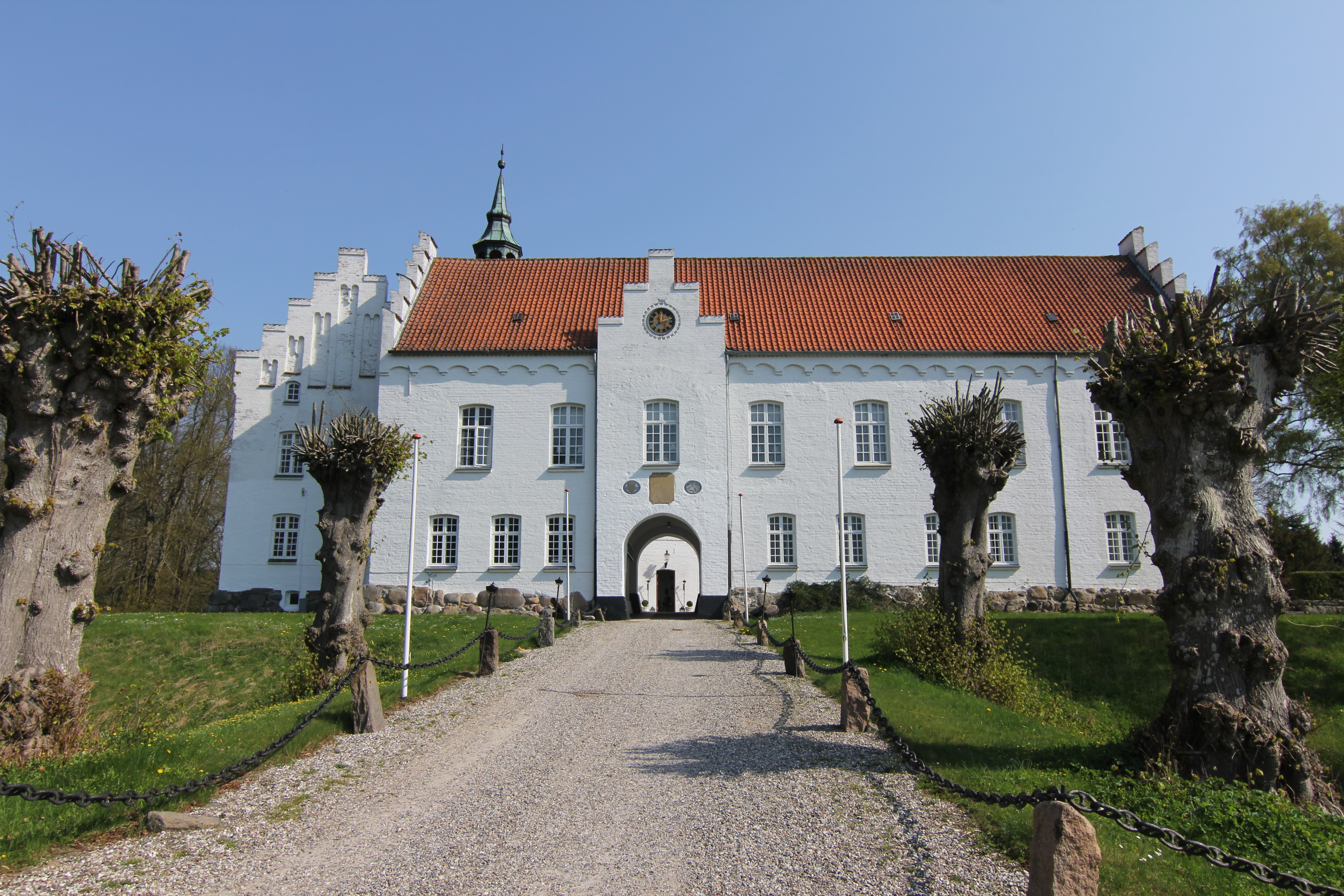 Kokkedal Slot i Nordjylland